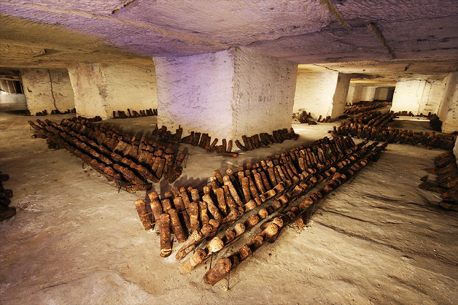 Ancienne champignonnière souterraine, culture à la verticale du Shiitaké.